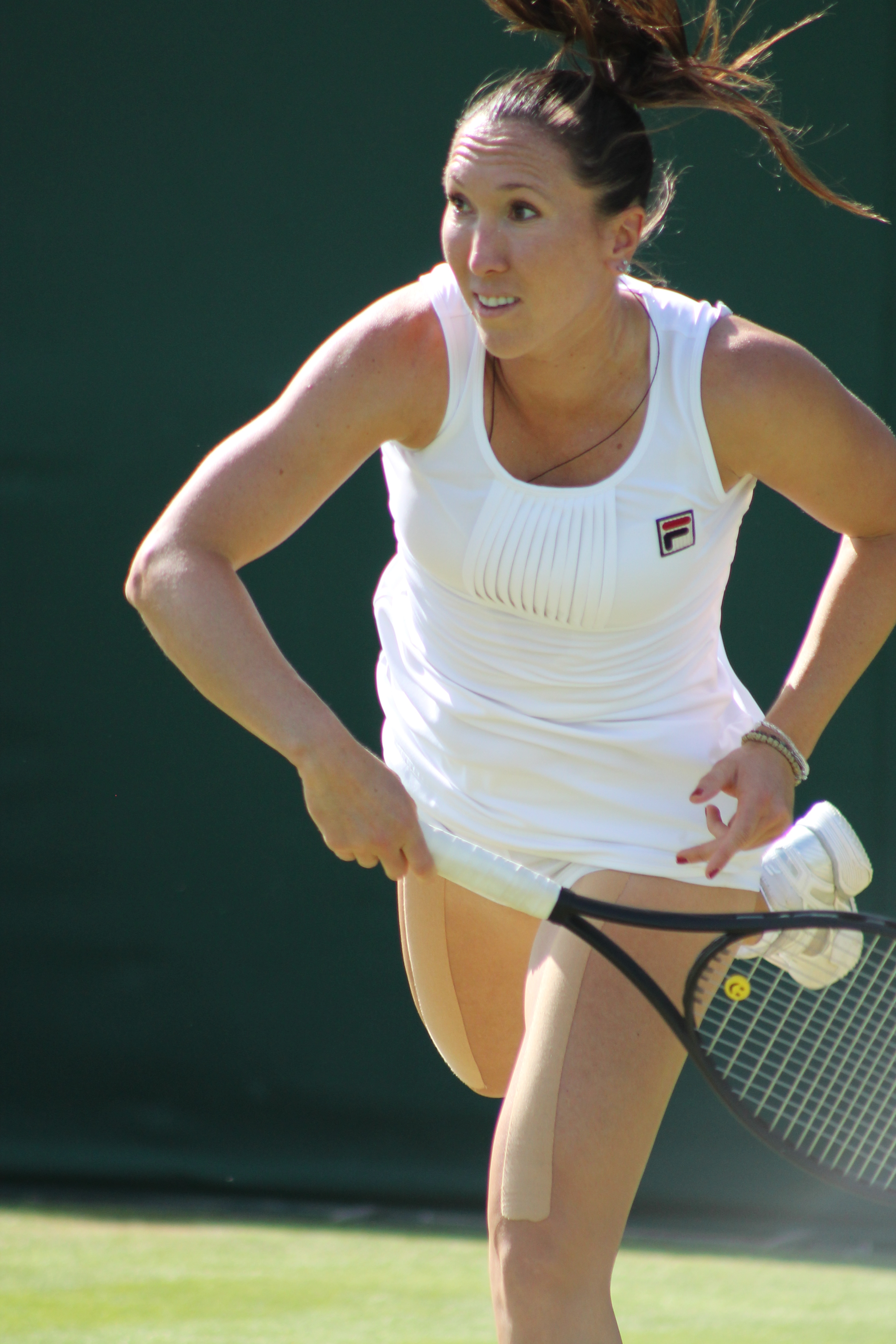 Jankovic WM13-005